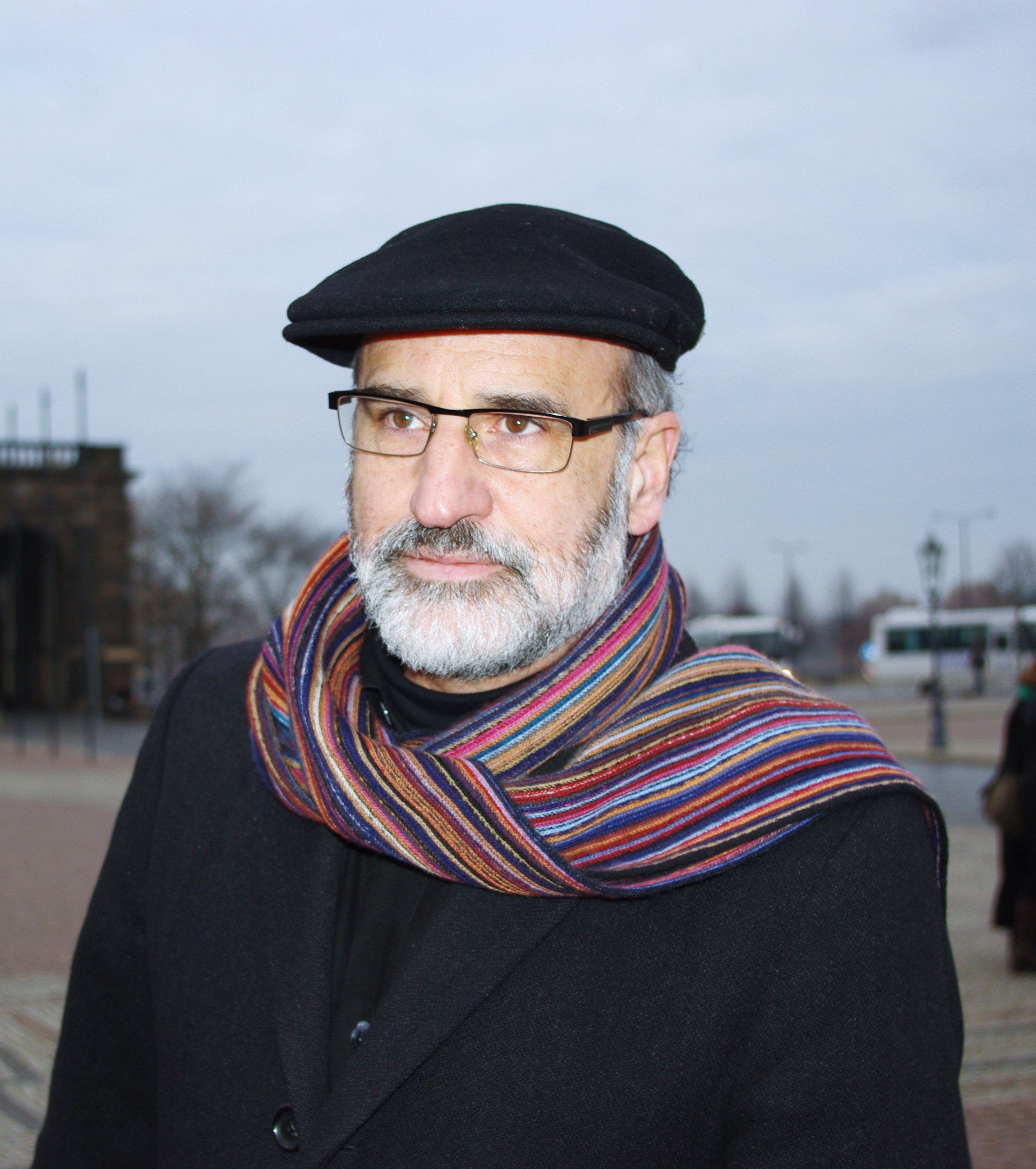 Fernando Aramburu